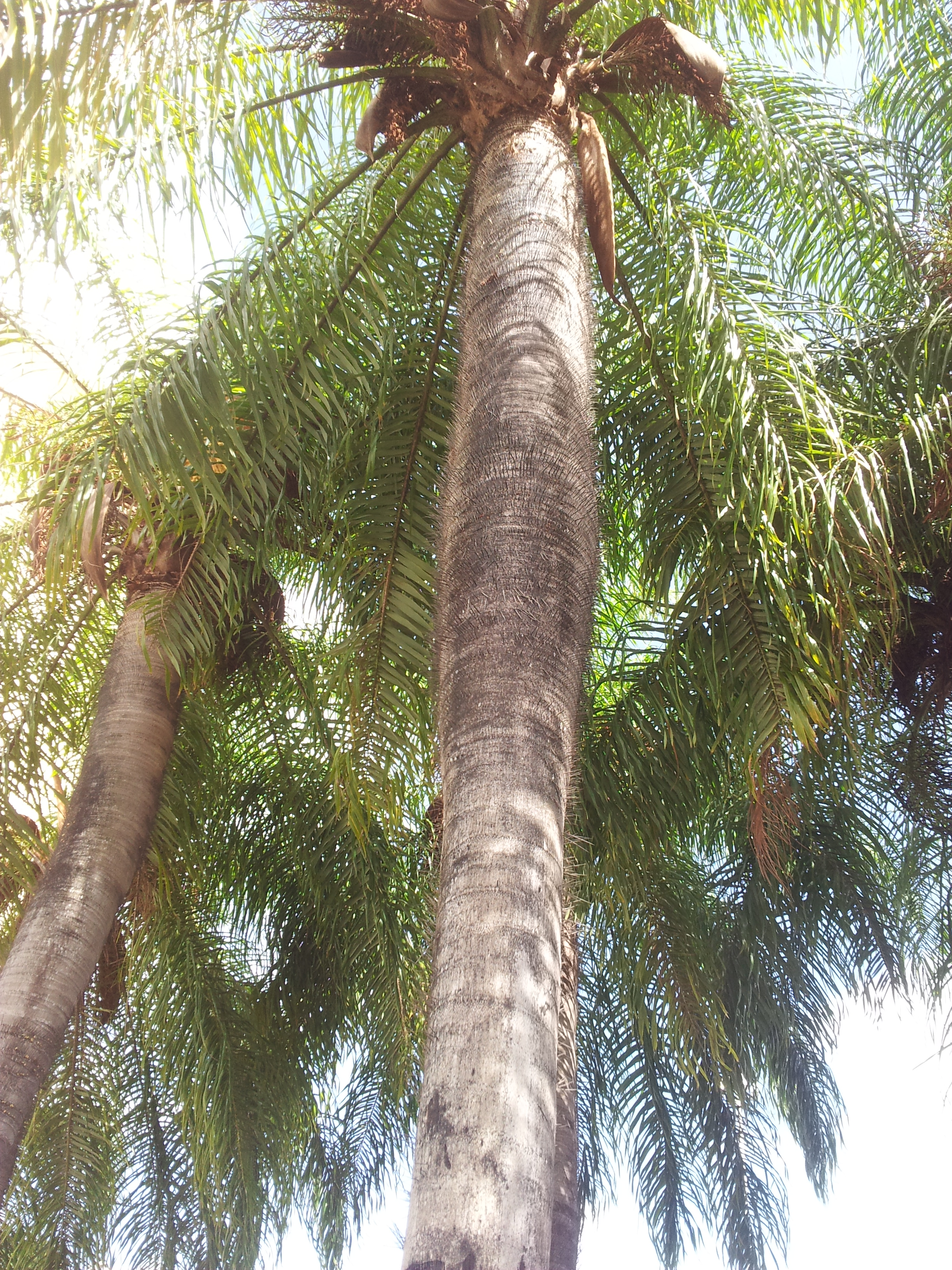 Palma de corozo (Acrocomia media), San Juan, Puerto Rico.